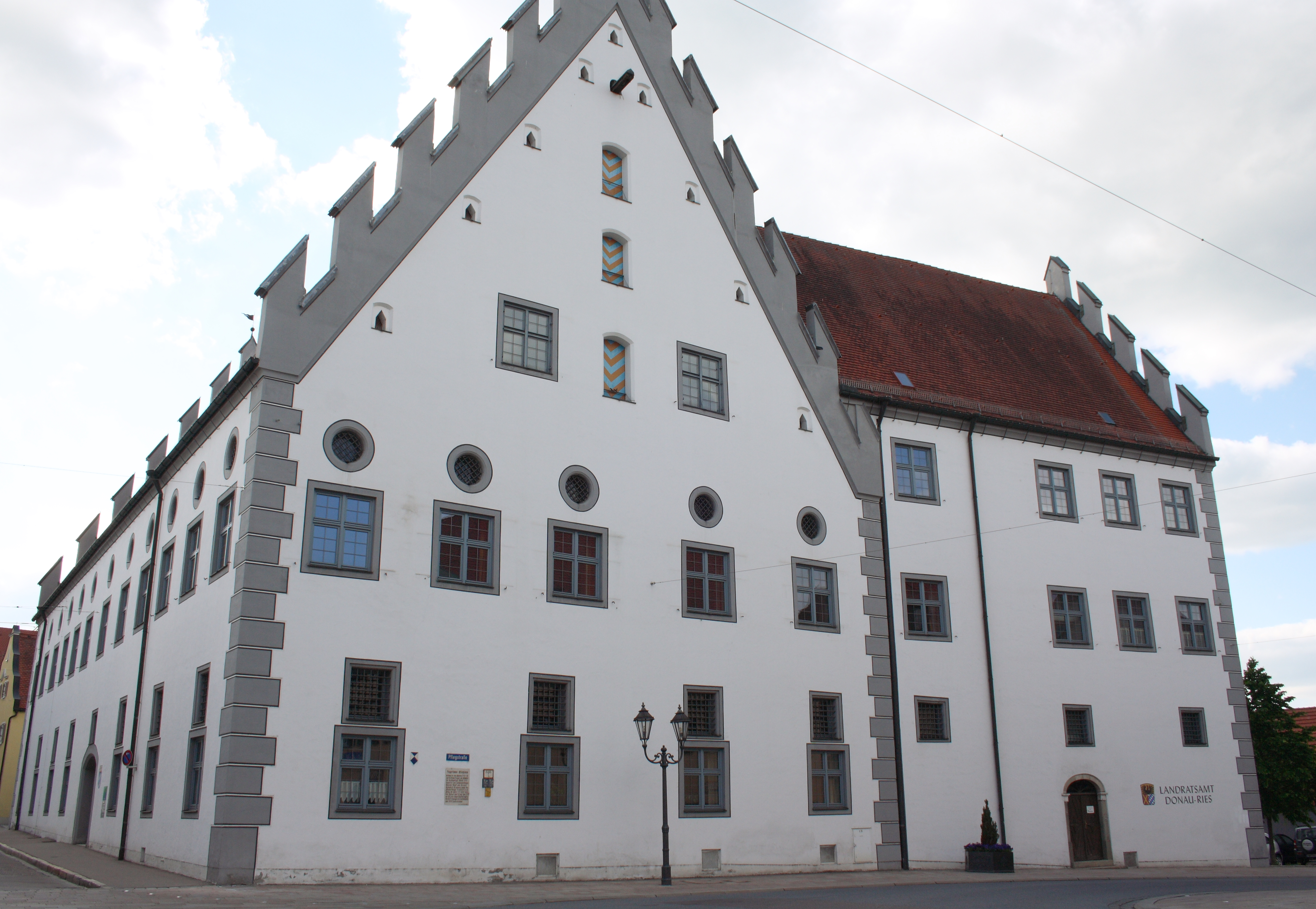 Kreisverwaltung in Donauwörth im Donau-Ries-Kreis (Bayern)